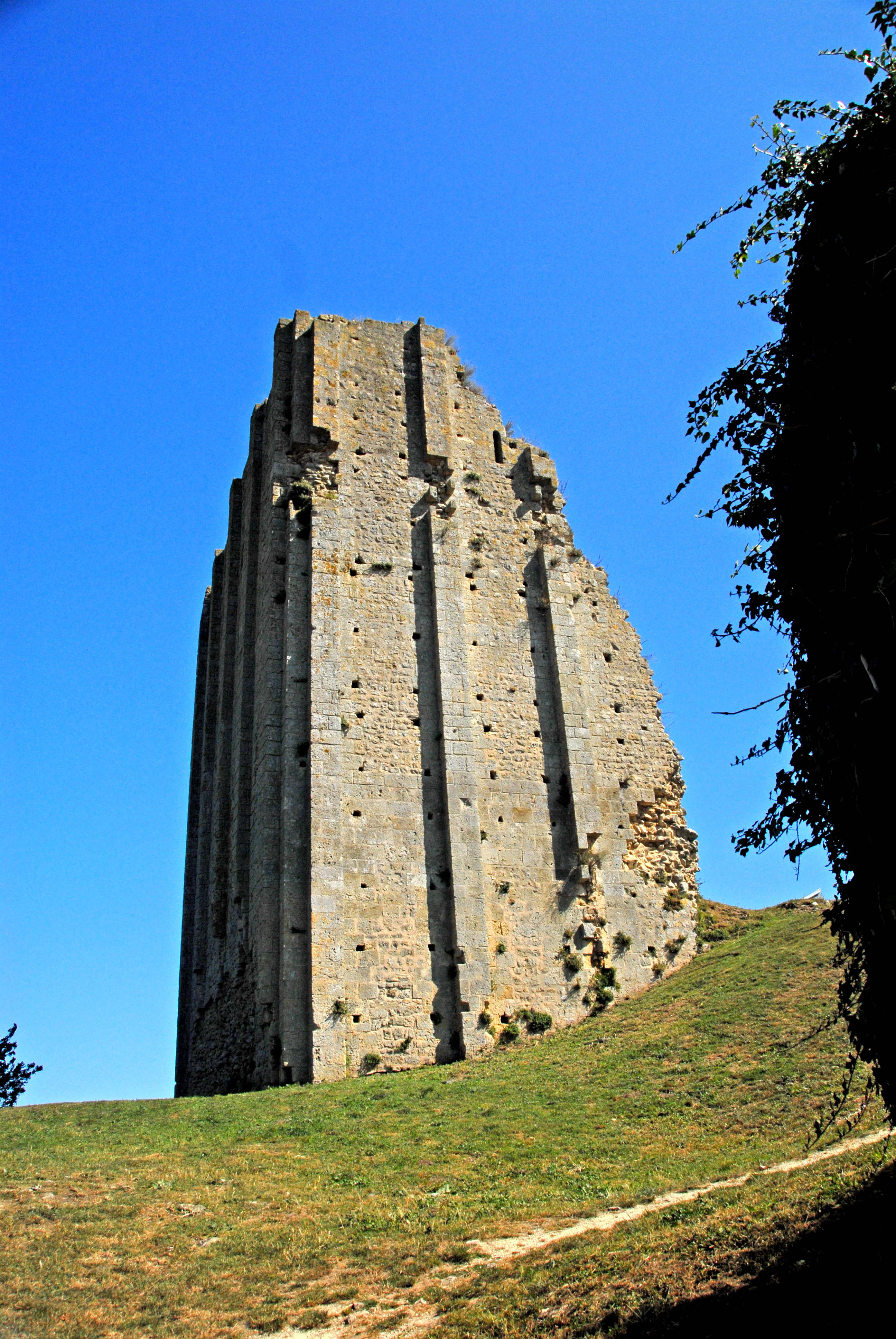 Tour-de-Broe, Ruine von Süden